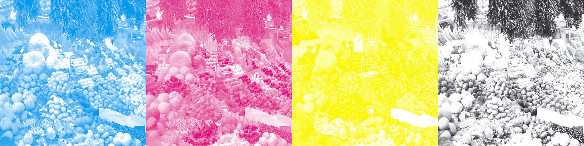 image pour exemple de séparation quadri